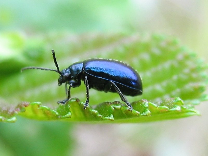 Erlenblattkäfer Agelastica alni (Seitenansicht)